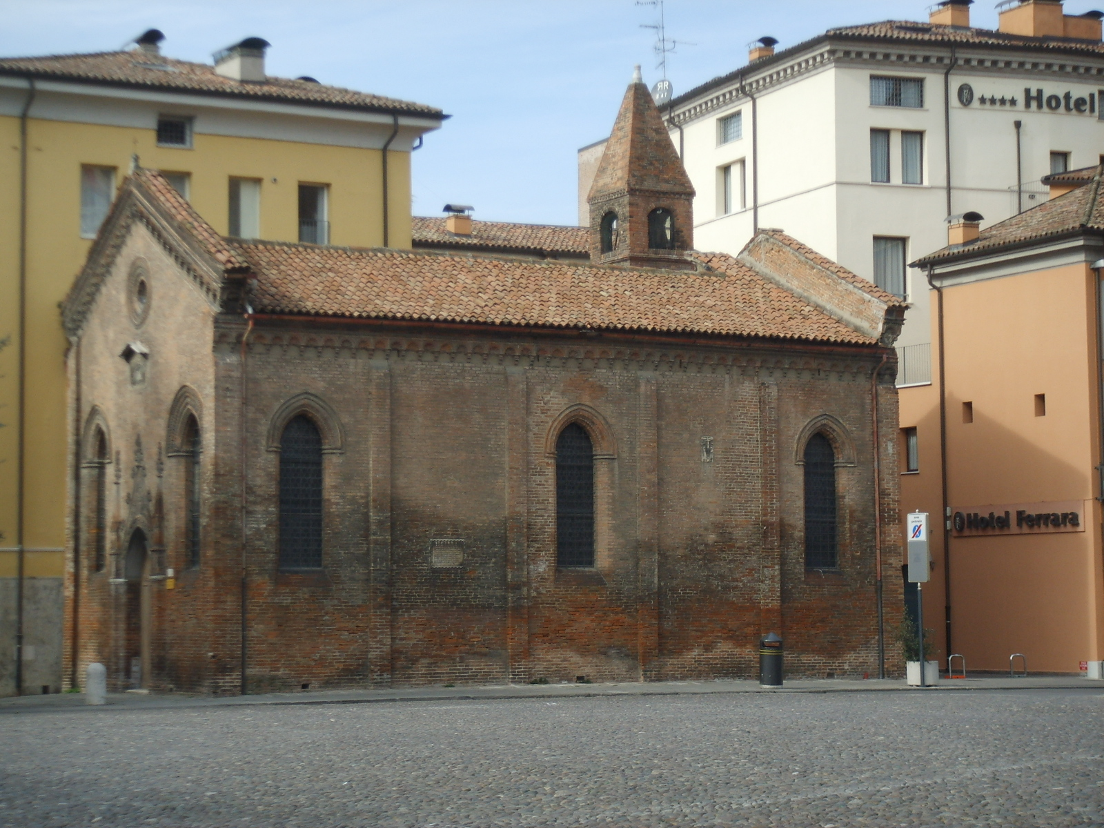 La chiesetta di San Giuliano a Ferrara.